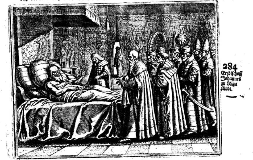 1527 Johann von Blanckenfeld sur son lit de mort